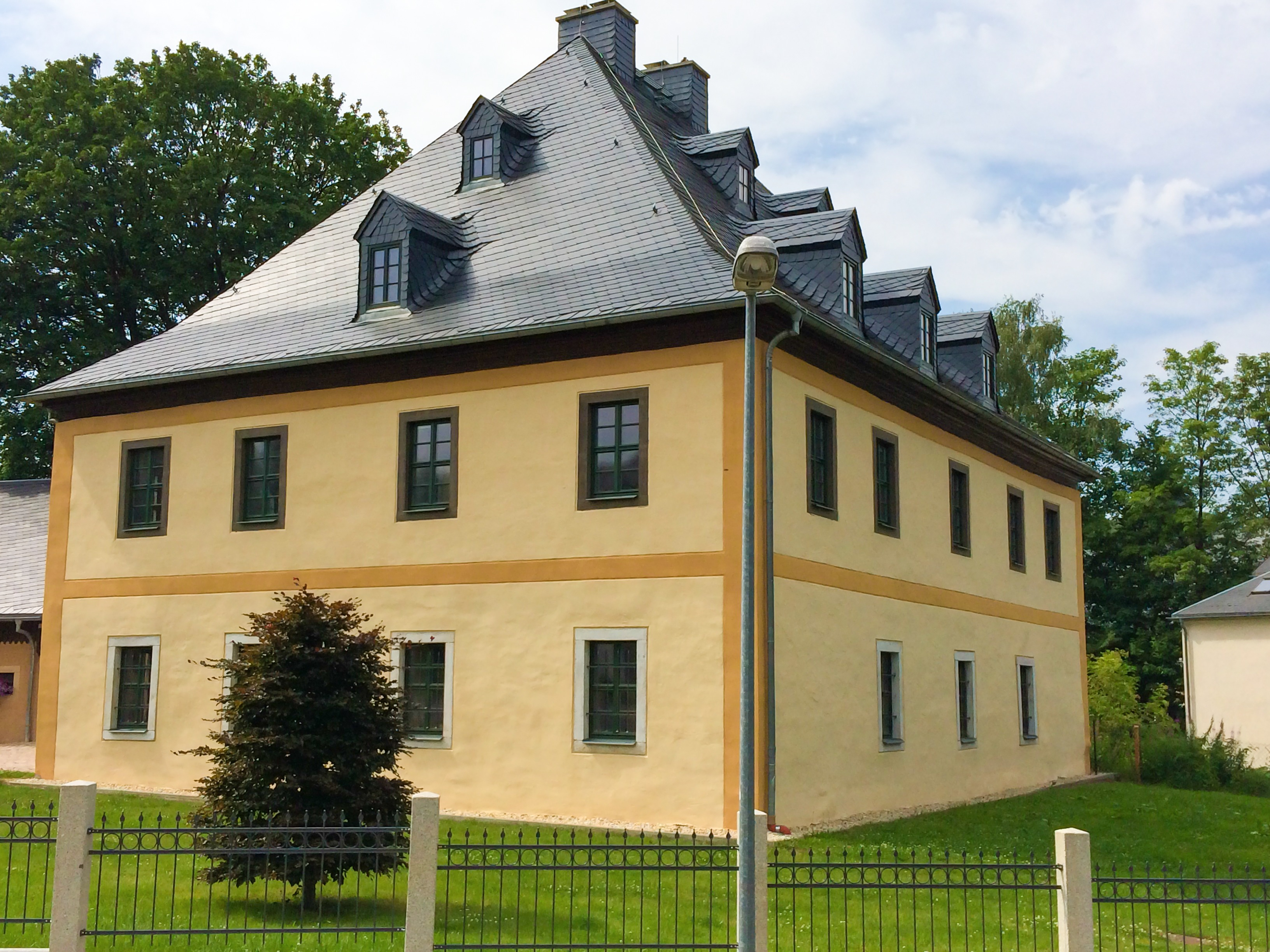 Ellefeld Oberes Schloss, Juli 2014